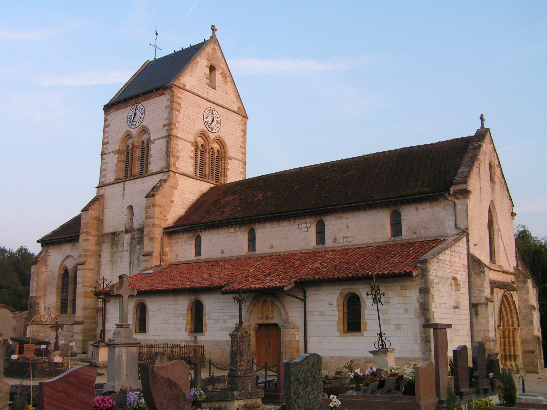 L'église Saint-Maurice d'Heiltz-l'Évêque (département de la Marne).